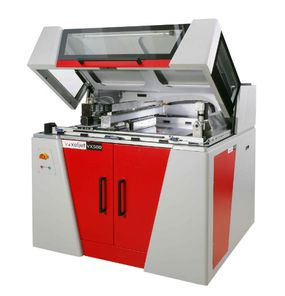 voxeljet 3D-Drucksystem VX500